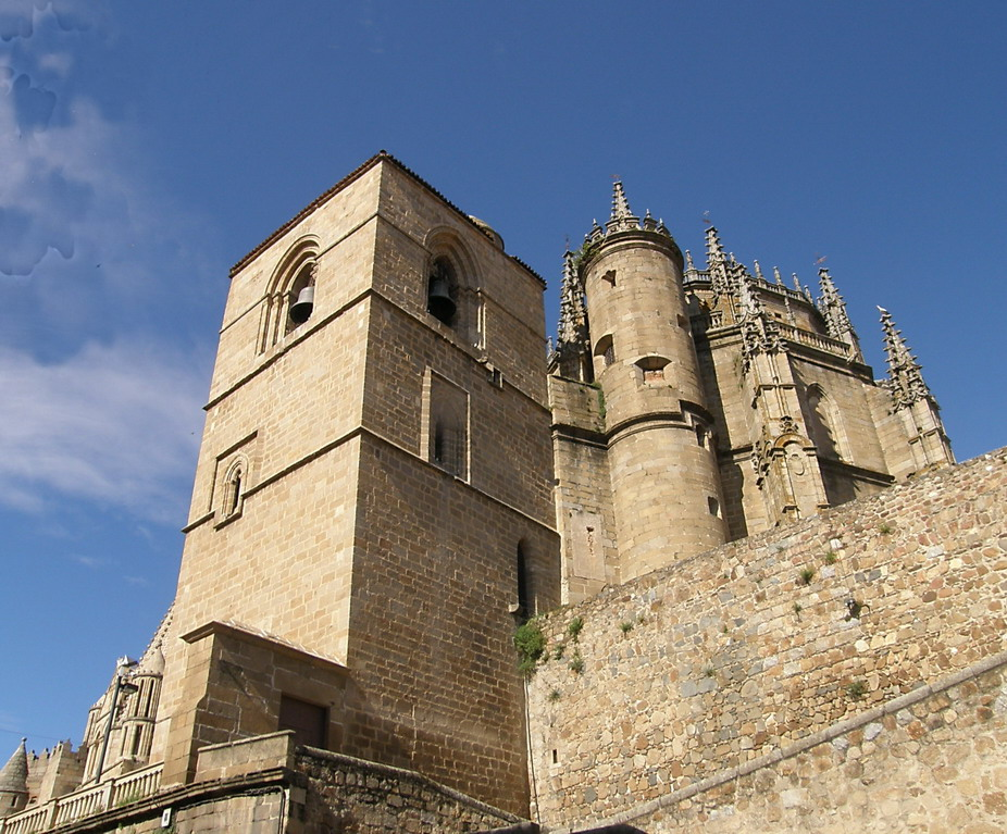 La torre del campanario tiene indudables influencias góticas en su estructura, con plantas marcadas por pompostas, con cubierta a cuatro aguas plenamente románicas, pero el despiezo de sus ventanas apuntadas, el tipo de capiteles de sus jambas, lo fino de las columnillas e incluso el alfiz que las encuadra son claramente góticos. La construcción puede situarse al final del siglo XIII a juzgar por los detalles mencionados.